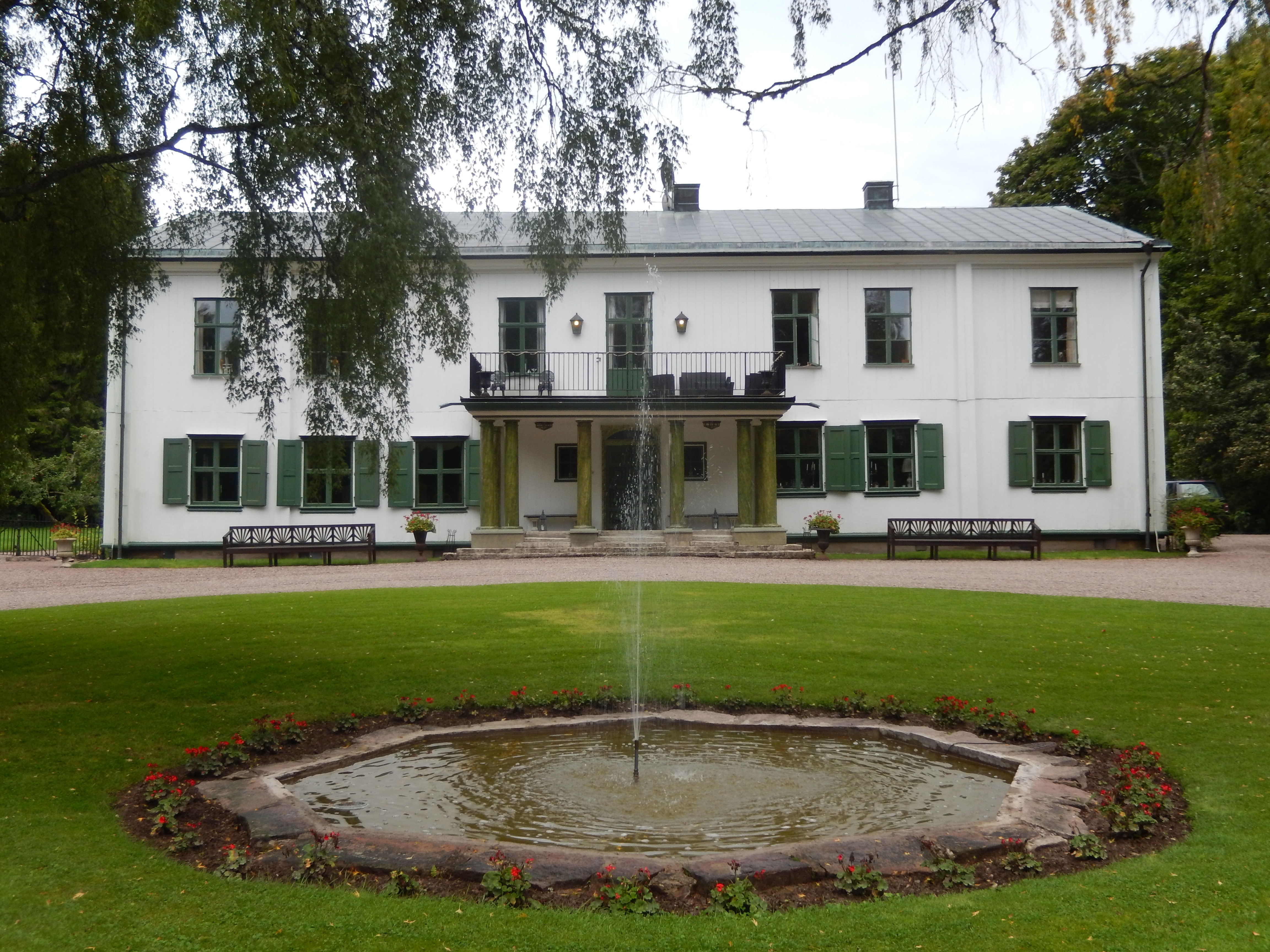 Apertins herrgård. Huvudbyggnaden.